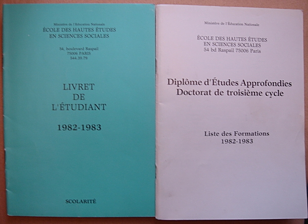 Les deux célèbres livret de l'étudiants à l'EHESS, le blanc et le vert